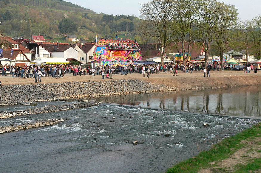 Der Fluss Emmer in Lüdge